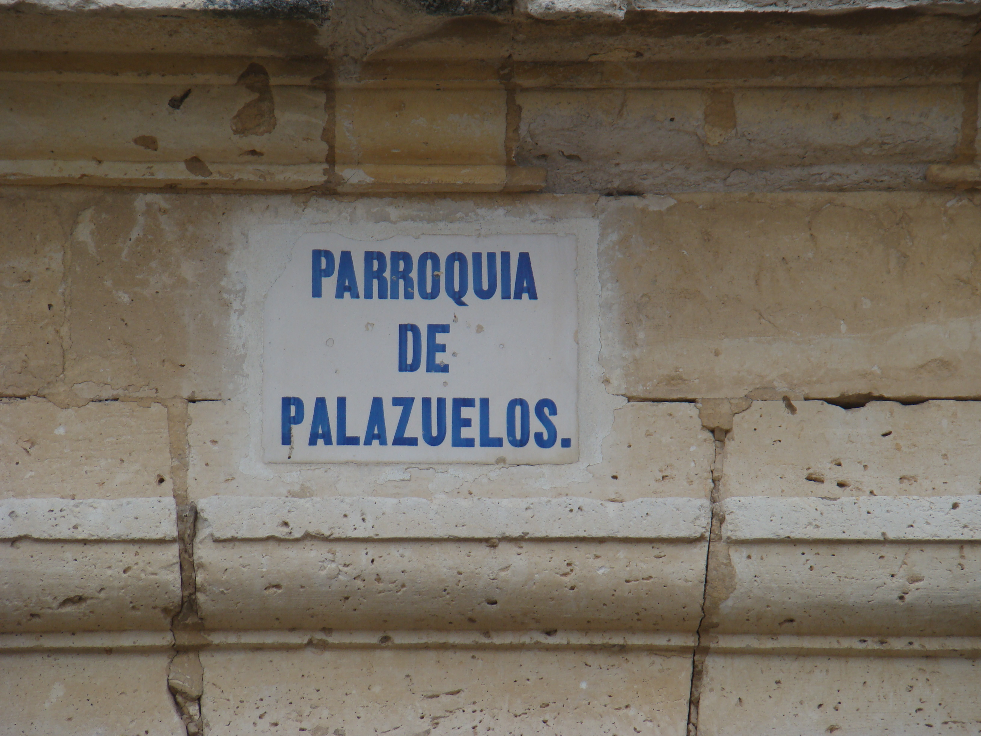 Monasterio de Palazuelos en la provincia de Valladolid. Fachada norte. Placa que indica la época en que fue parroquia.